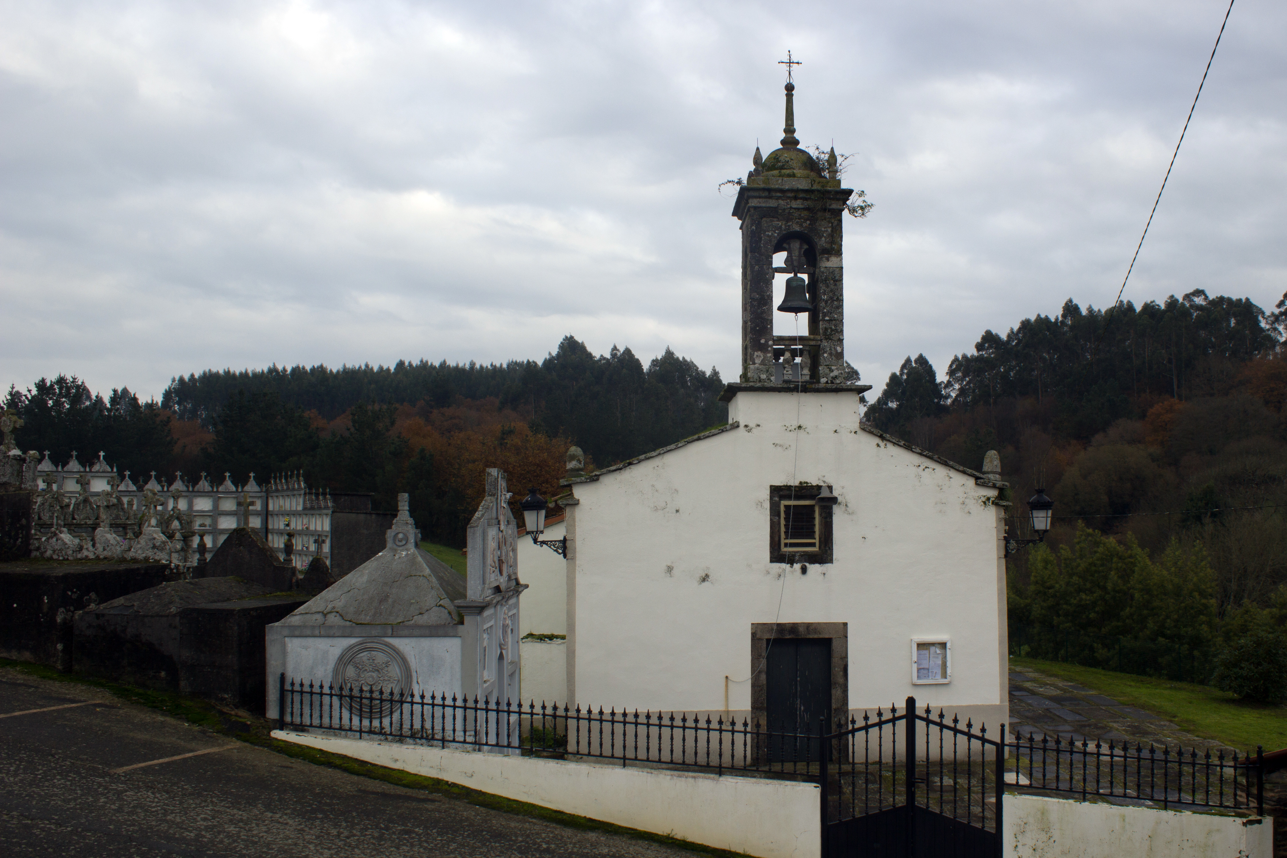 Igrexa de Santo Estevo de Medín, no concello do Pino.